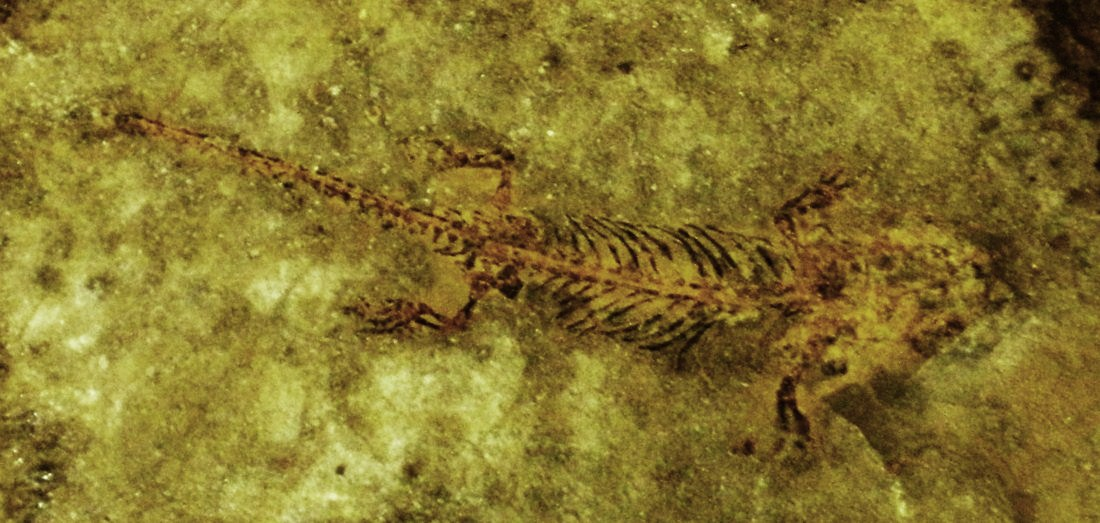 Fossil of Batropetes, an extinct amphibian